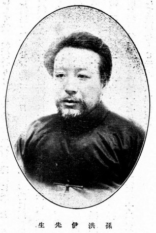 中文（台灣）: 孫洪伊肖像